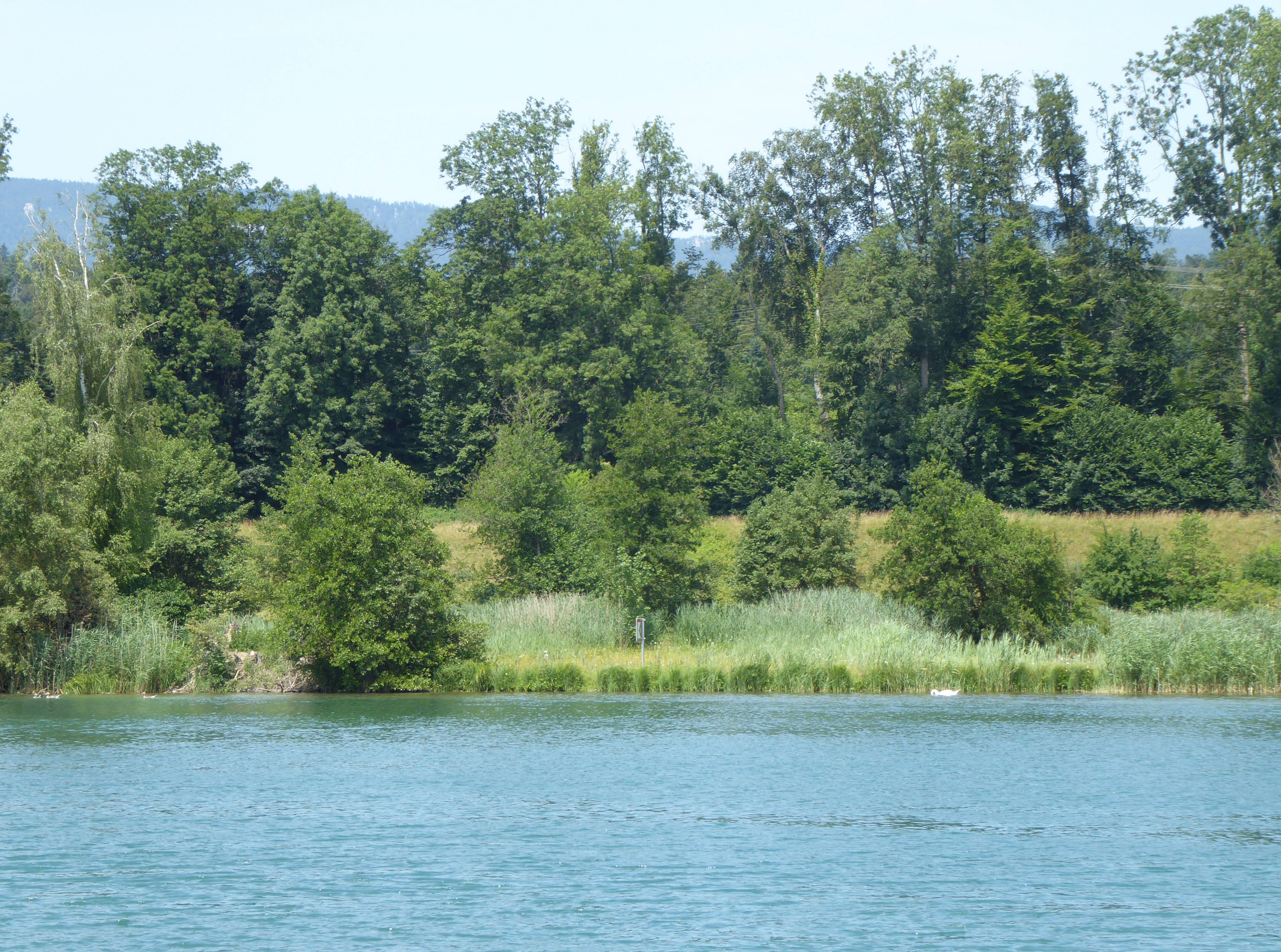 Ansicht der Aareinsel Vogelraupfi, Kanton Bern, von Süden aus. Detail.